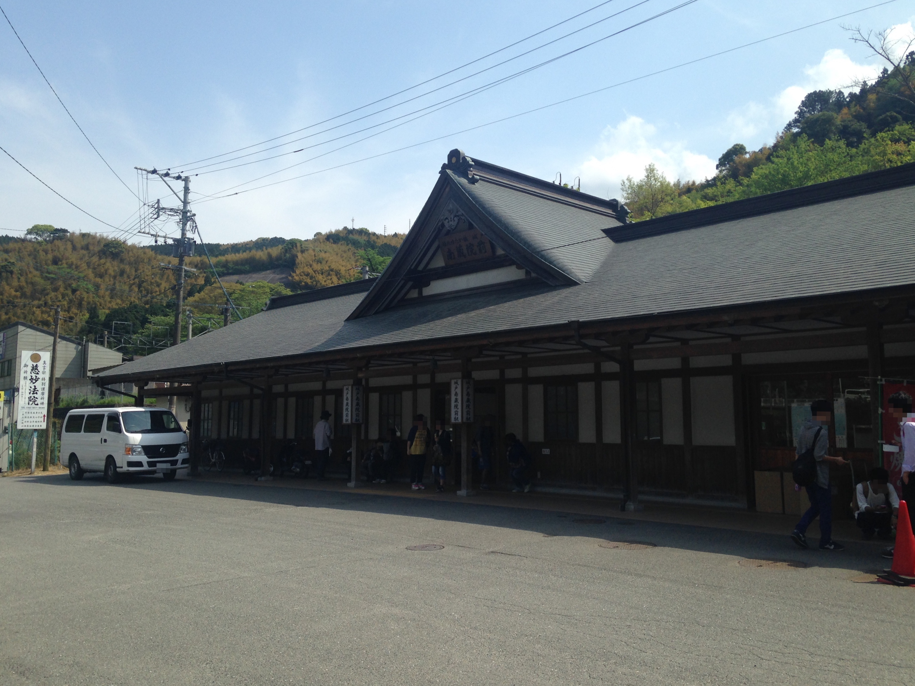 城戸南蔵院前駅駅舎